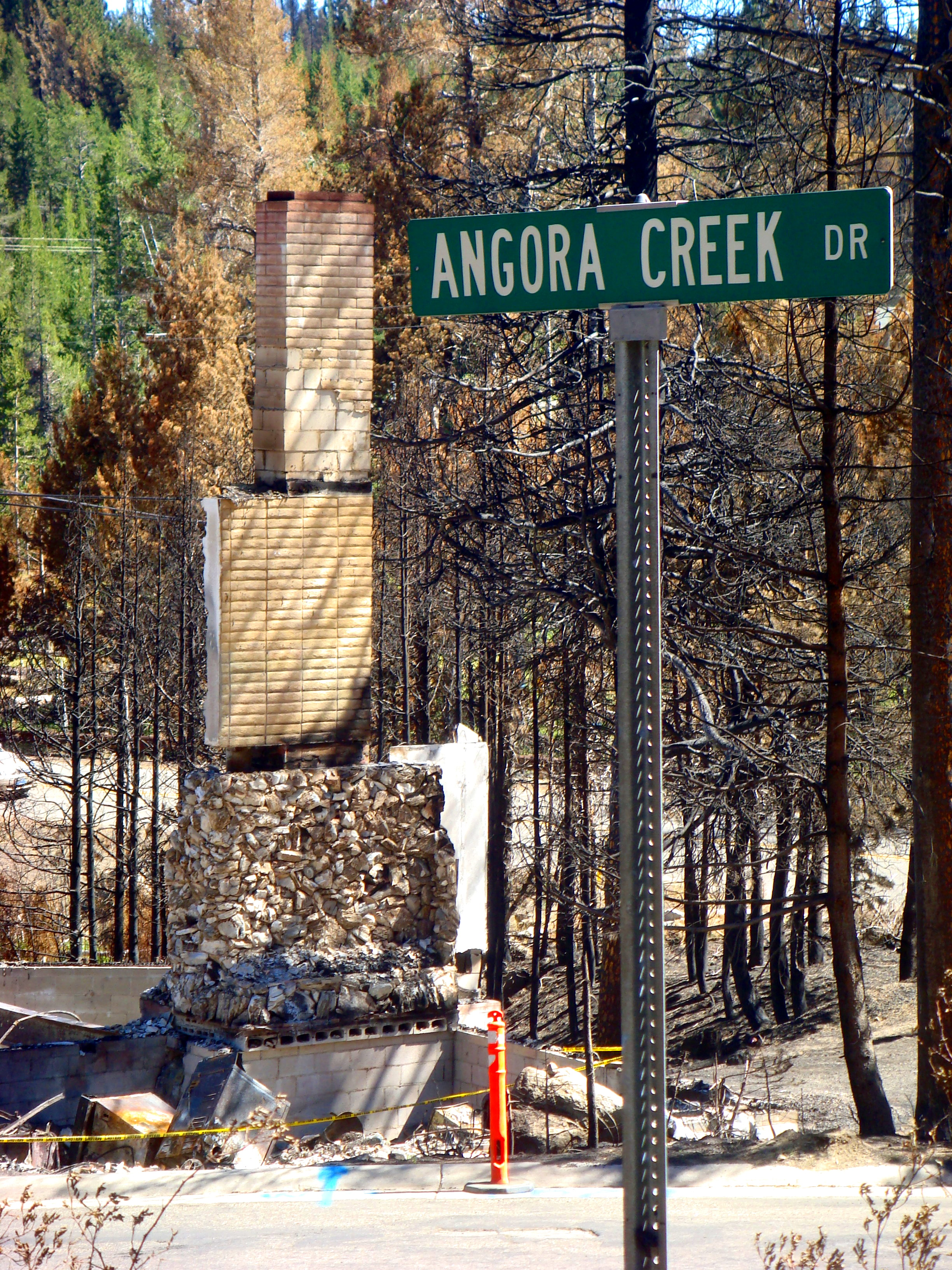 Angora Creek Street sign